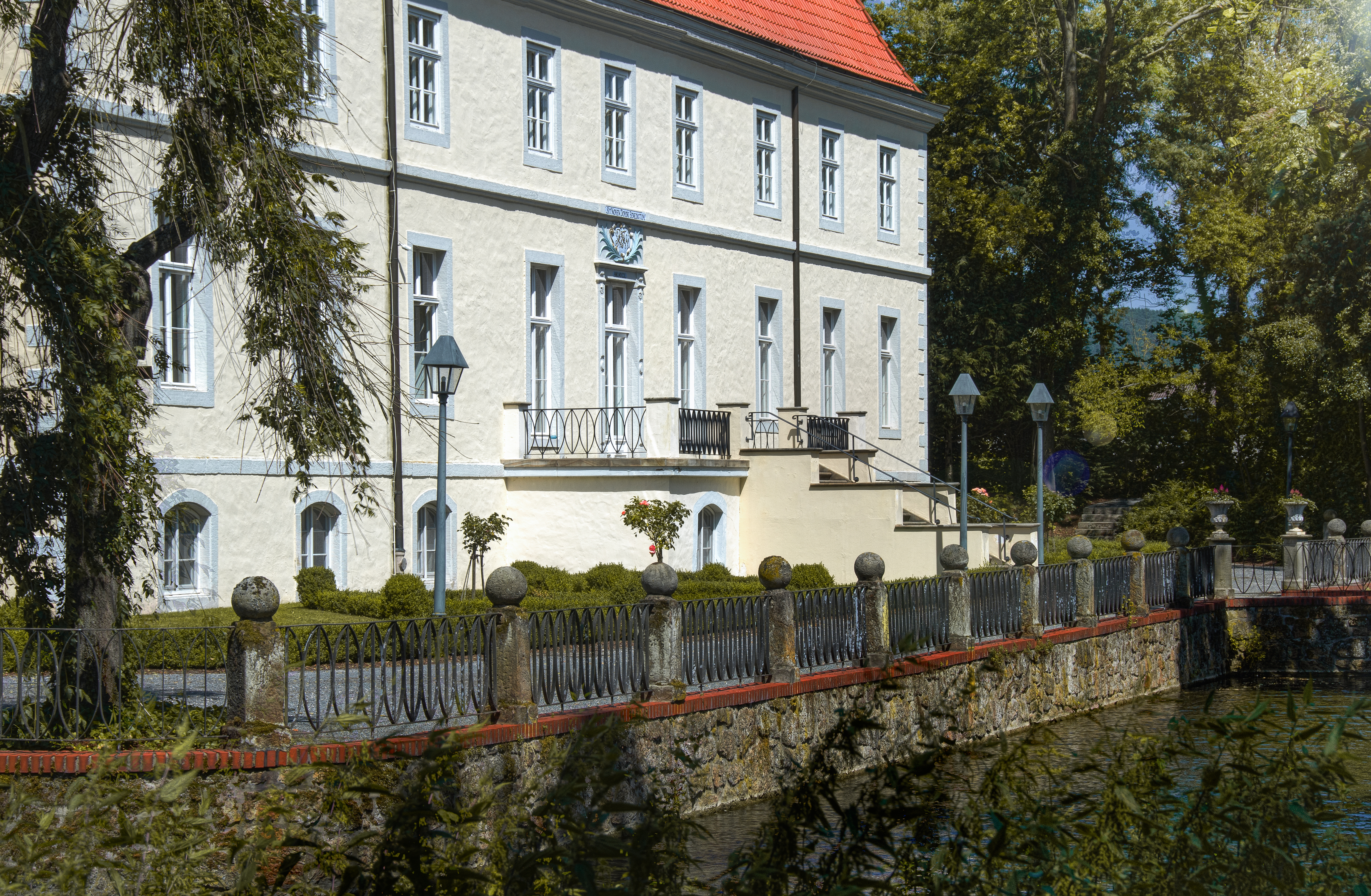 Wasserschloss Ovelgönne